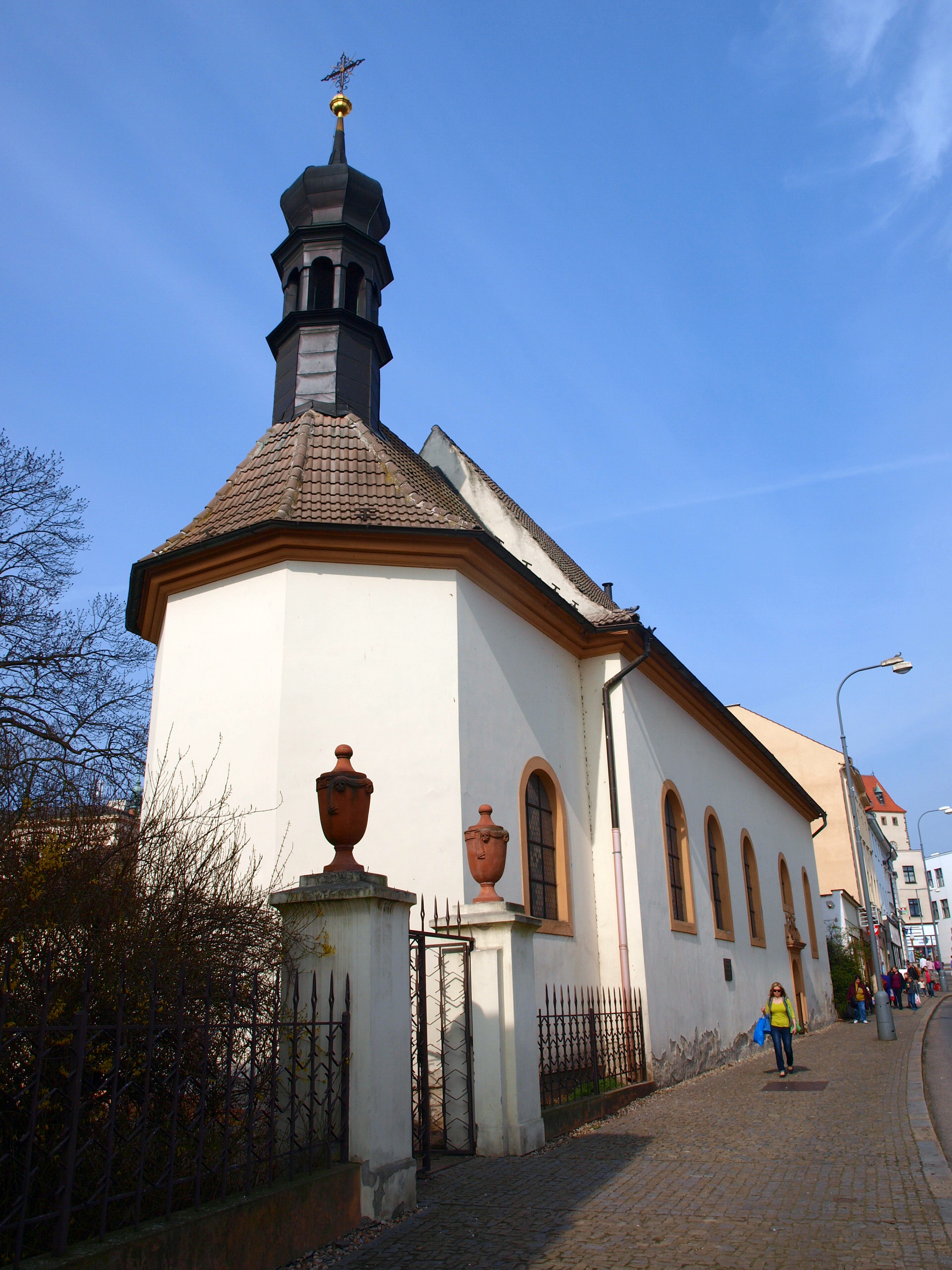 Mělník kostel sv. Ludmily